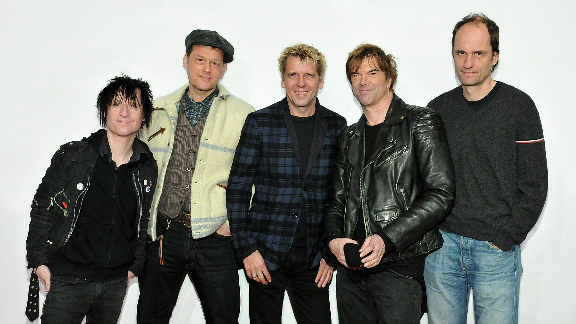 Die Toten Hosen auf der Verleihung der Eins-Live-Krone in Bochum am 5. Dezember 2013